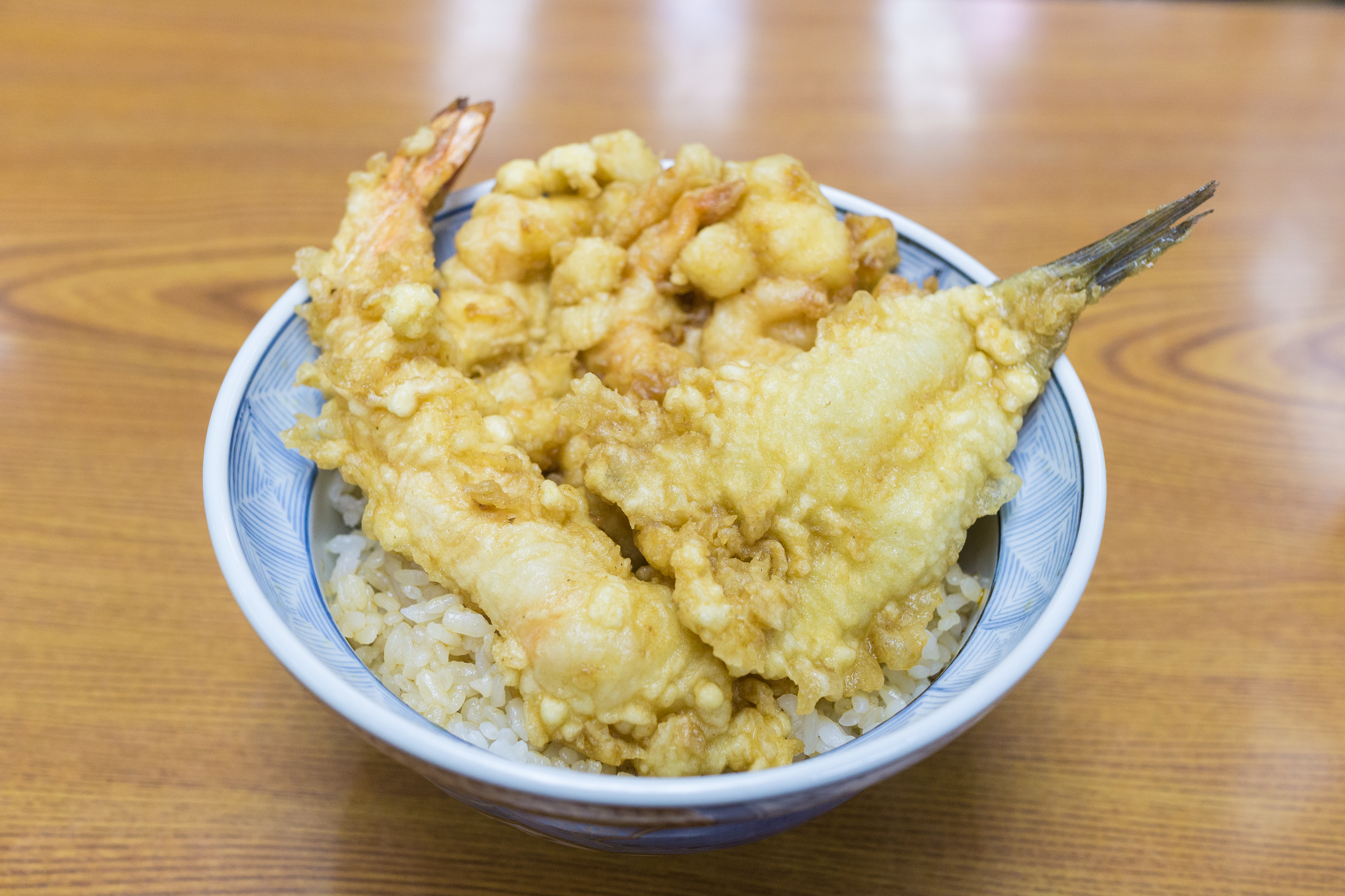 天ぷら三定 / Tenpura Sansada